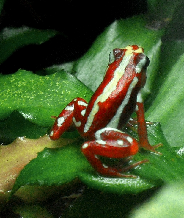 Epipedobates anthonyi - Botanischer Garten Leipzig